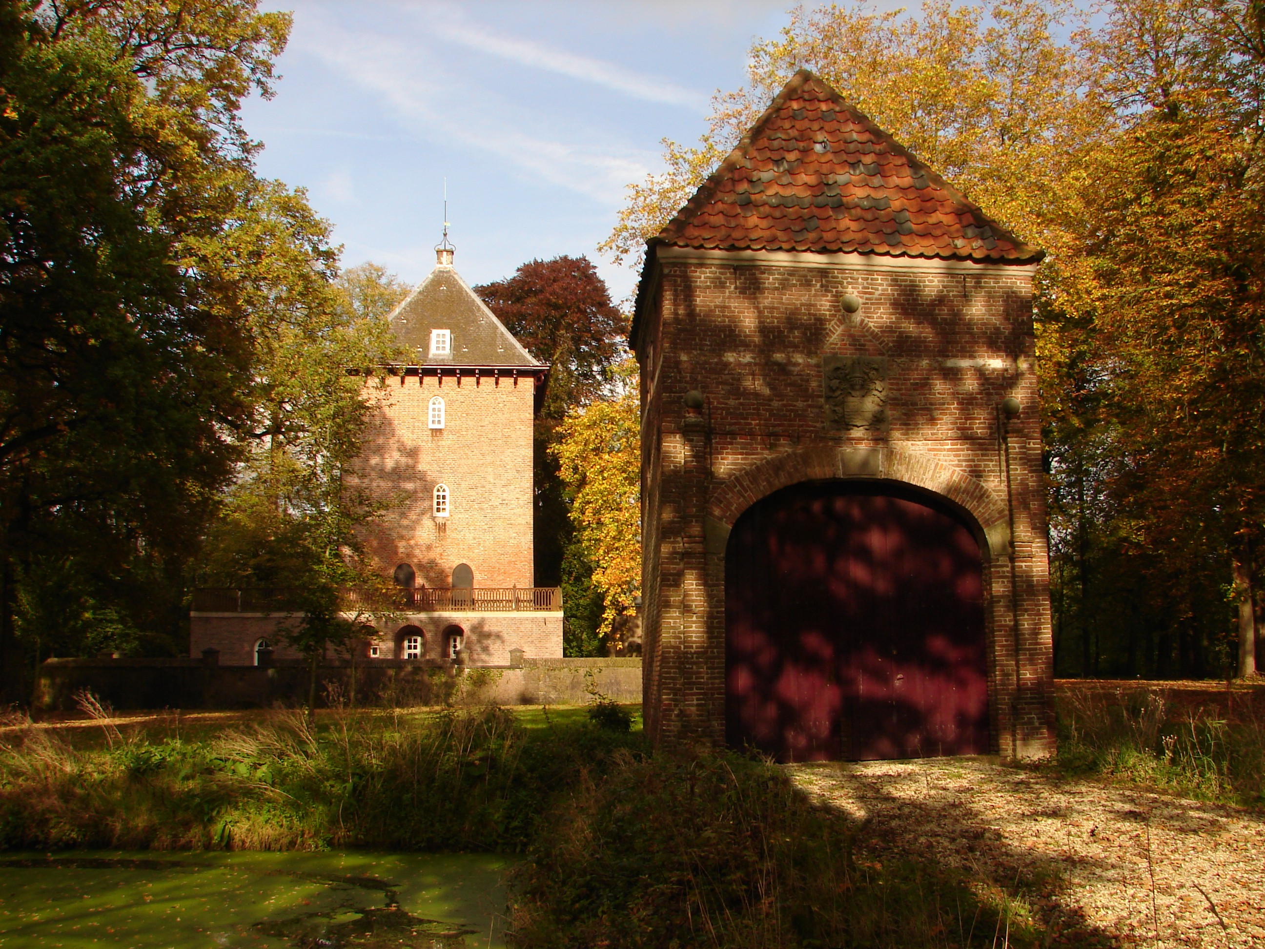 Overzicht van Kasteel Weerdestein en de 17e eeuwse toegangspoort.